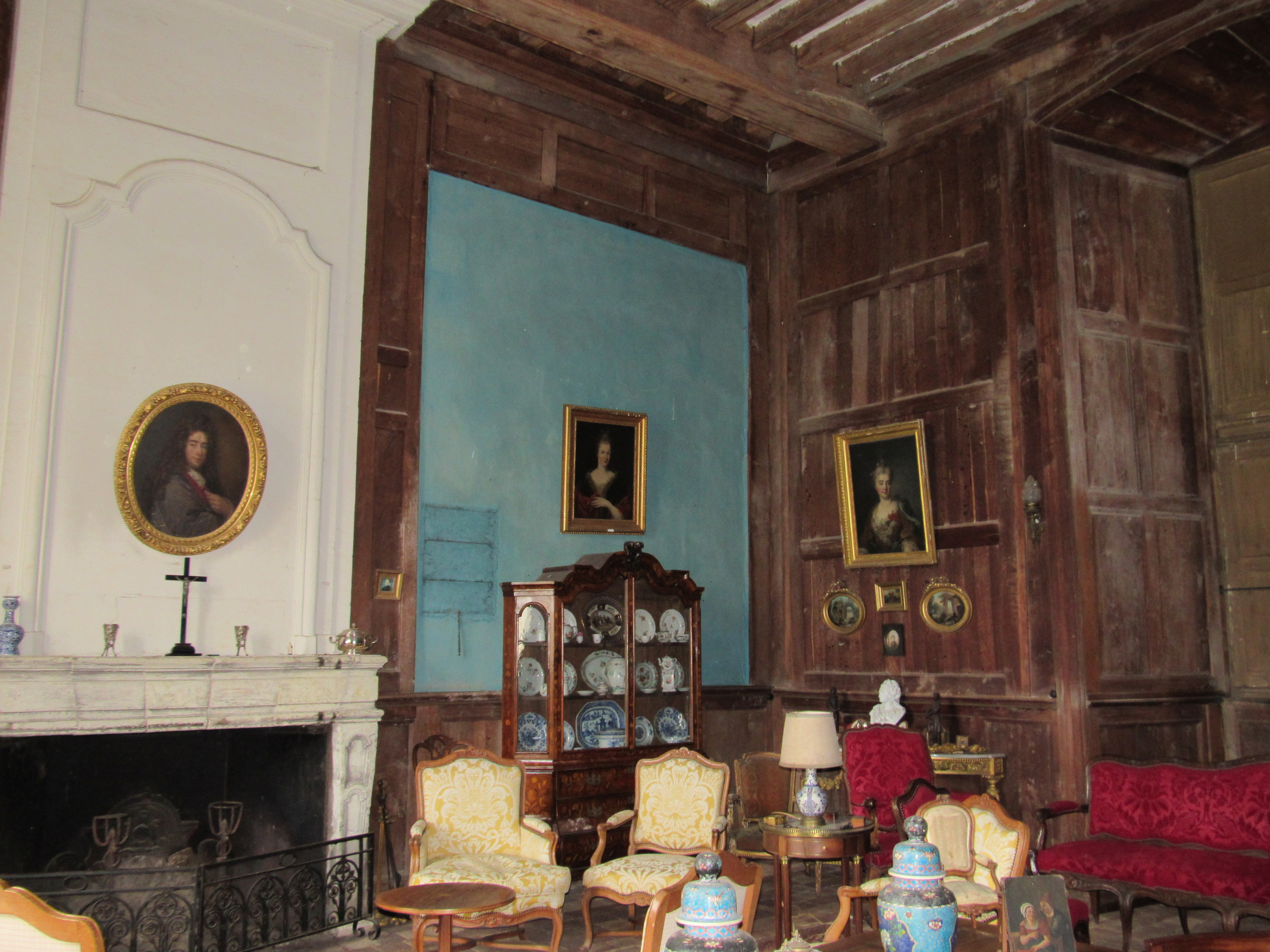 Salon du château de la Motte-Glain. Sur la cheminée, on peut voir un portrait de Michel II Le Lou, propriétaire du château au XVIIe siècle.